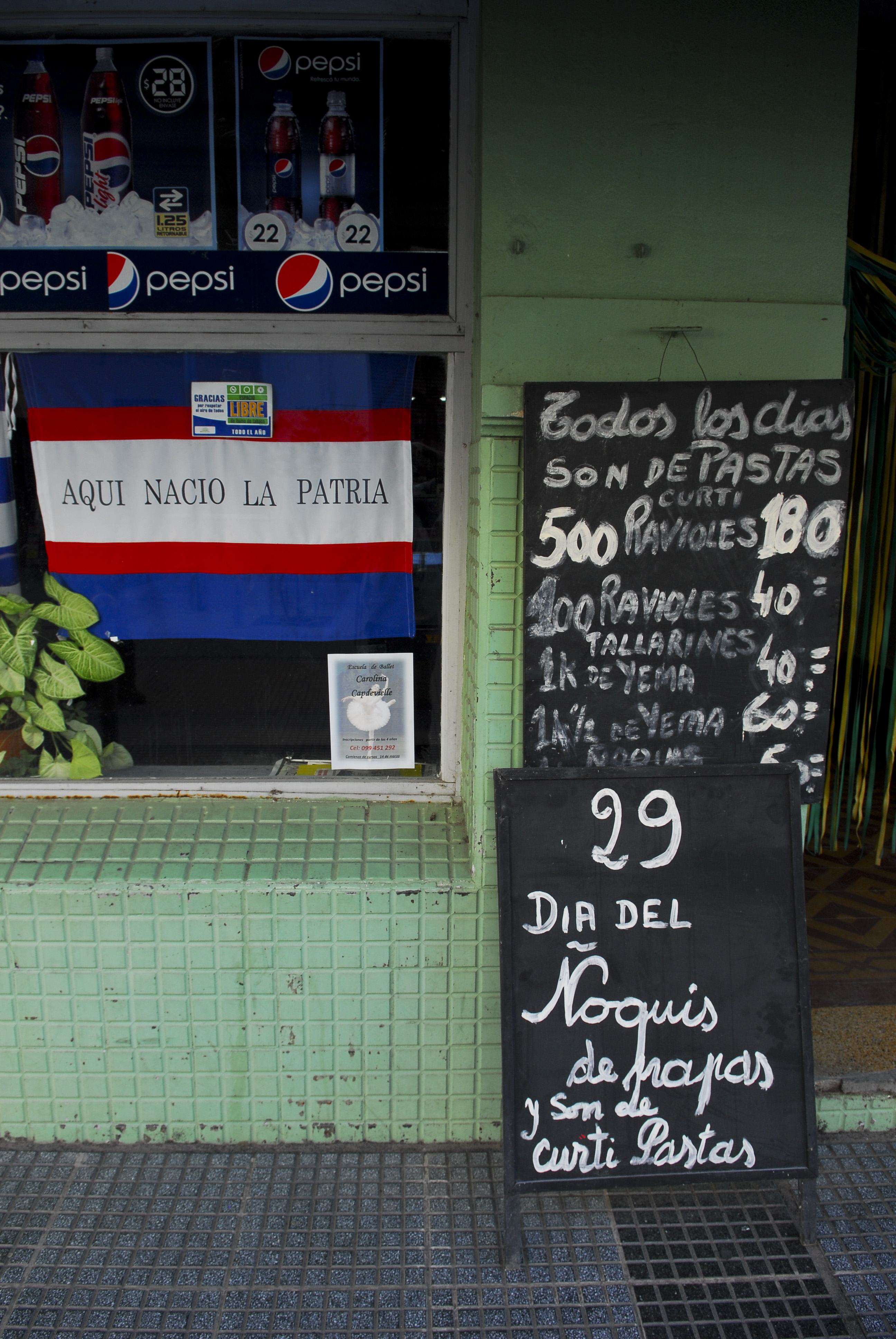 La ciudad se prepara para el festejo